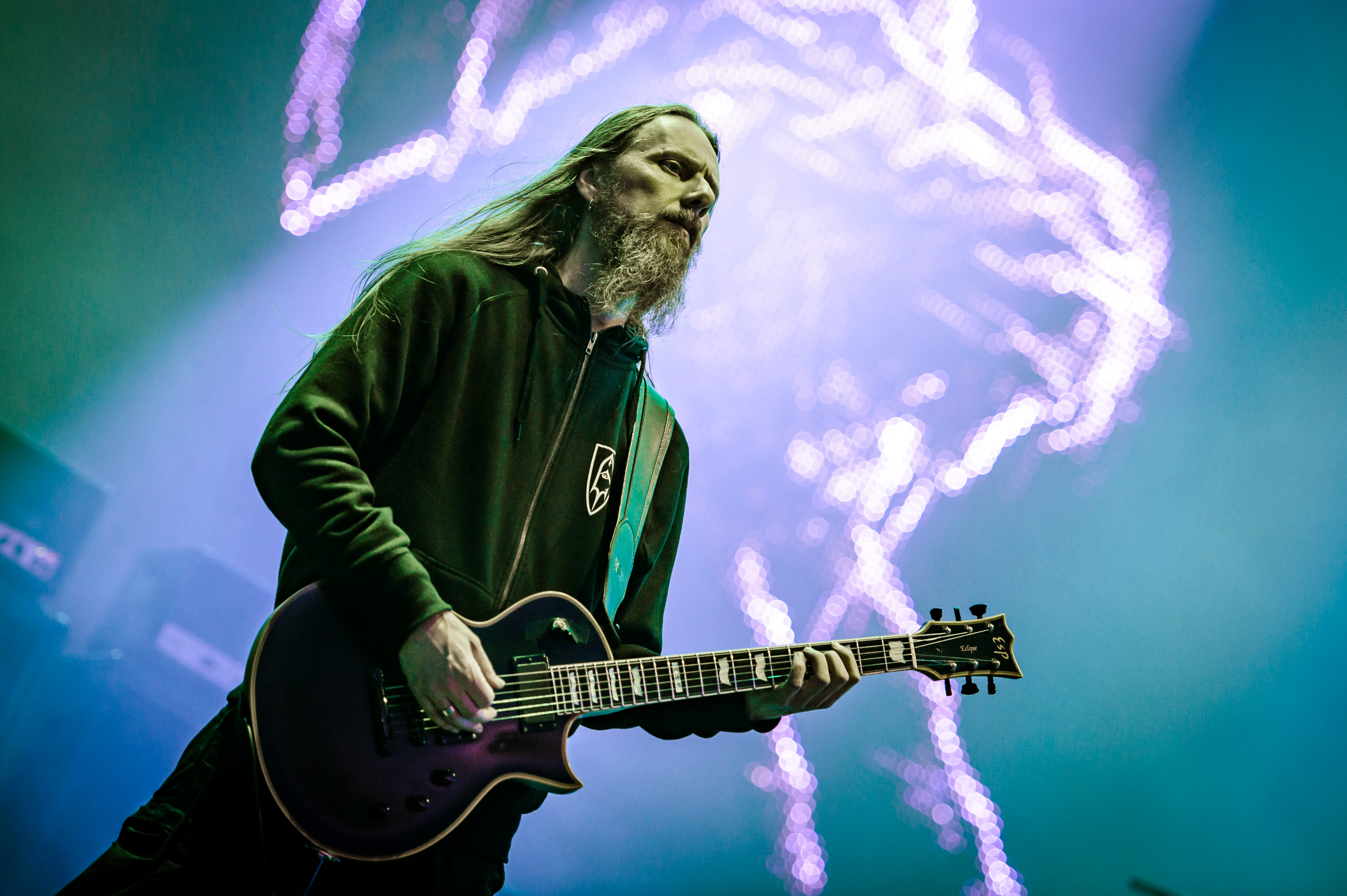 'Wacken Open Air 2017; Wacken': 'Emperor'